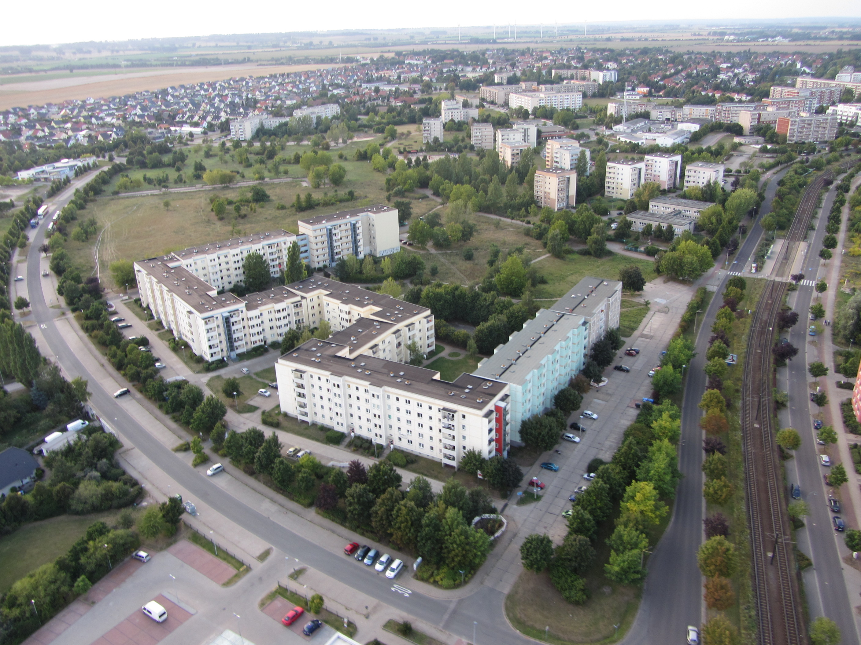 Blick aus einem Ballon über Olvenstedt, Magdeburg